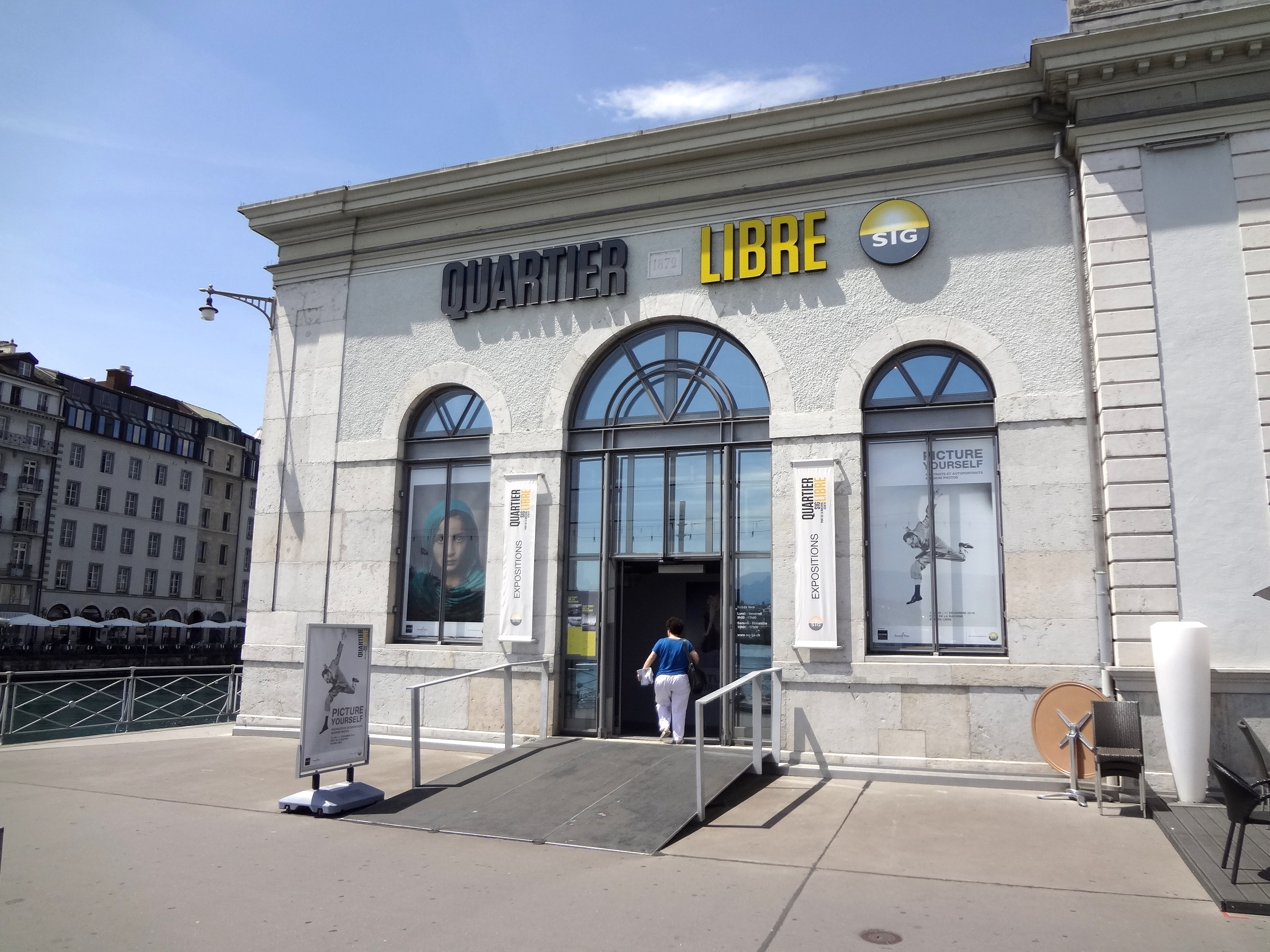 Espace d'exposition des Services industriels de Genève (SIG) occupant une partie de l'ancien bâtiment industriel du Pont de la Machine : « Quartier Libre ».